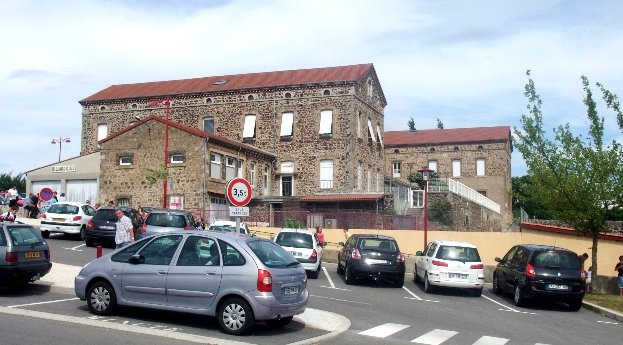 Davézieux Alumnat